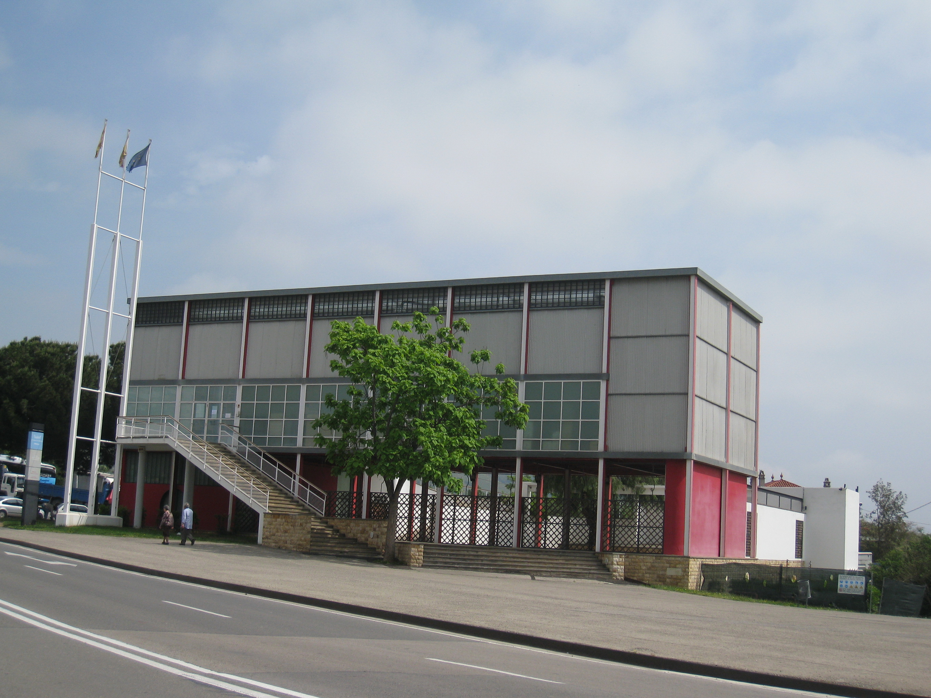 Reproducció del pavelló de la república espanyola a l'exposició universal de Paris de 1937. En aquest pavelló va ser presentat en públic per primer cop la pintura "Guernica" de Picasso. El 1992 el pavelló es va reproduir a la ciutat de Barcelona (Catalunya) i actualment forma part de la Universitat de Barcelona.